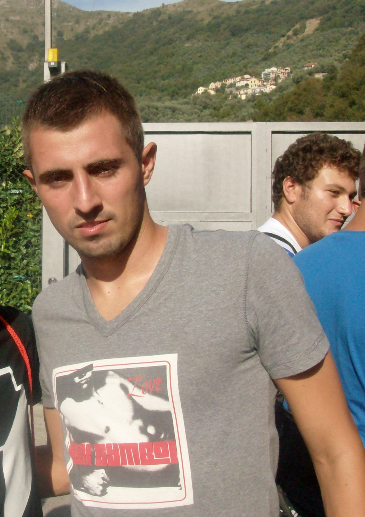 Nenad Krstičić al Mugnaini